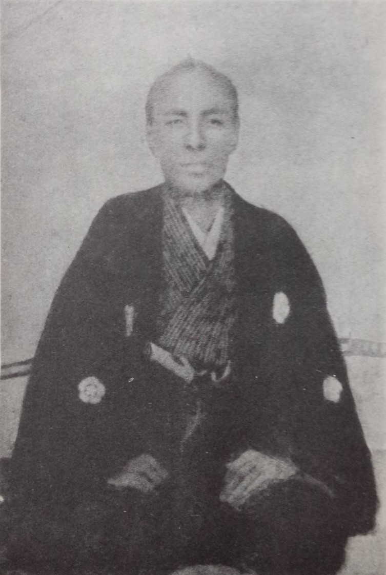 織田信学の肖像写真。